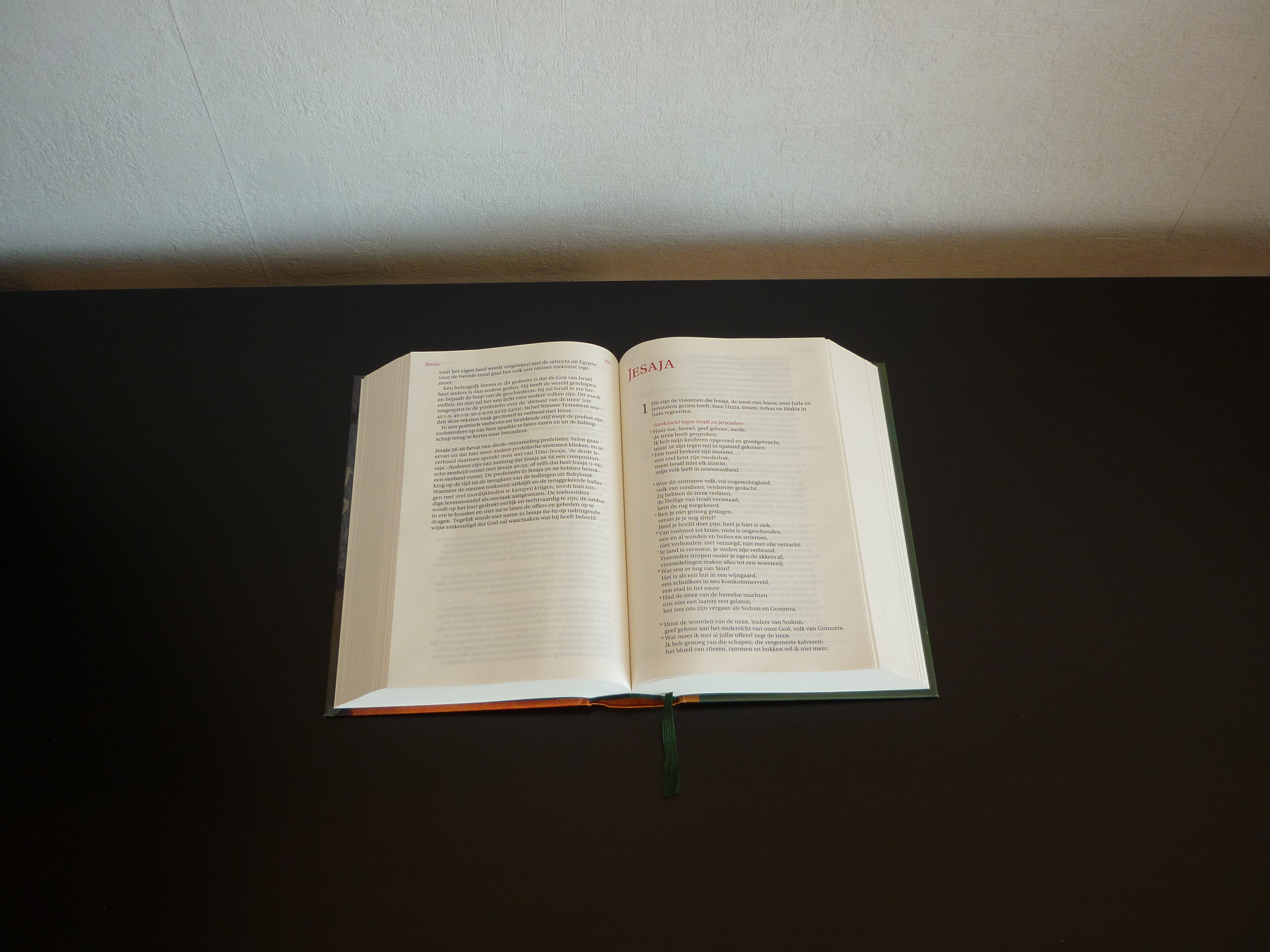 Nieuwe Bijbelvertaling opengeslagen op Jesaja 1. De bijbel op de foto is een uitgave inclusief de deuterocanonieke boeken.